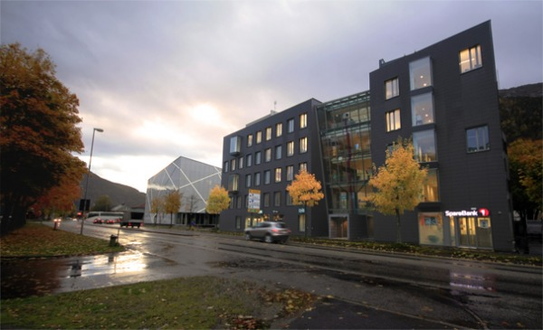 Fylkesbiblioteket i Sogn og Fjordane er samlokaliserte med kulturavdelinga i fylkeskommunen, midt i Førde sentrum i Storehagen Atrium.